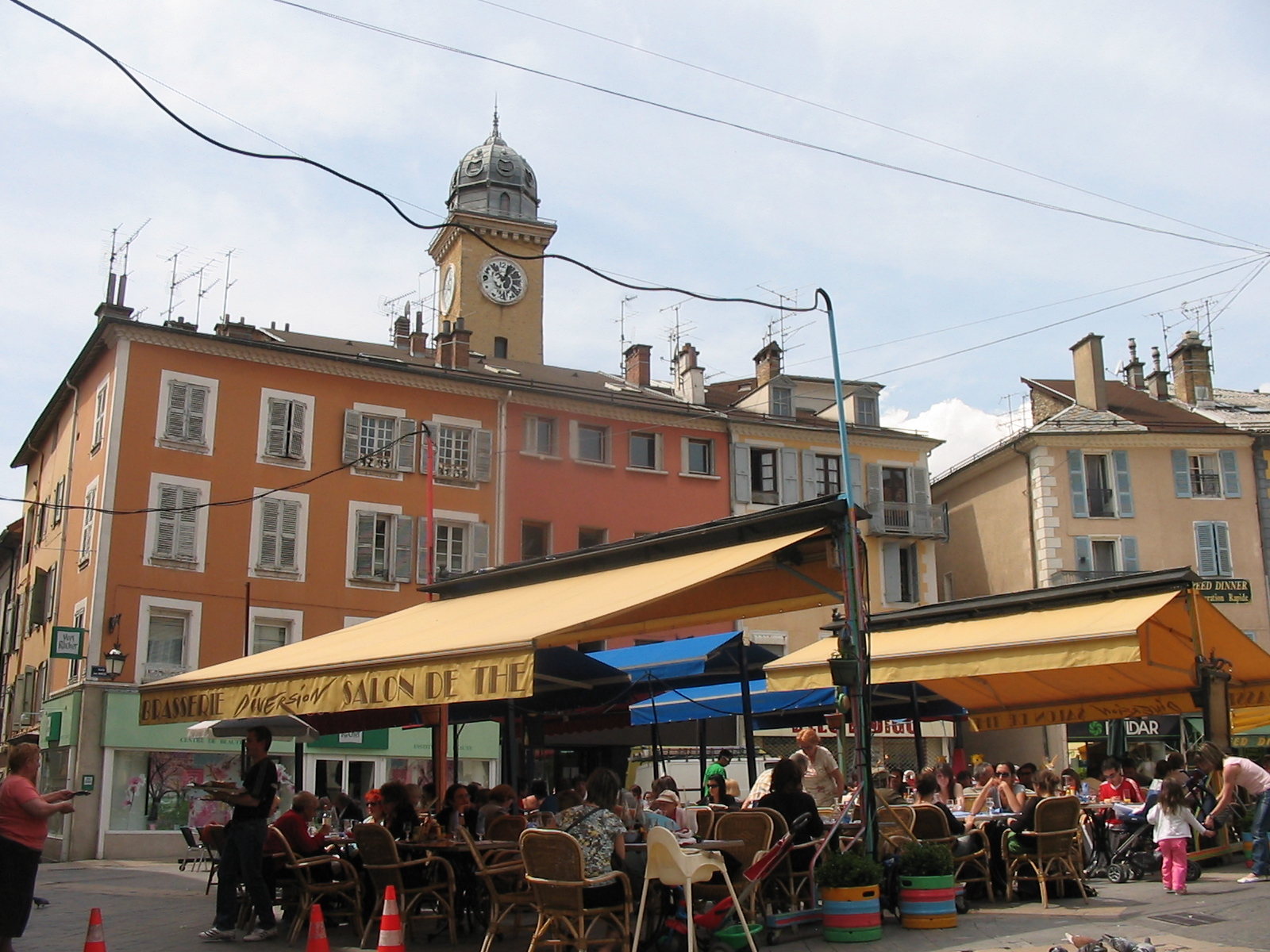 Place Jean. Marcellin à Gap (05).